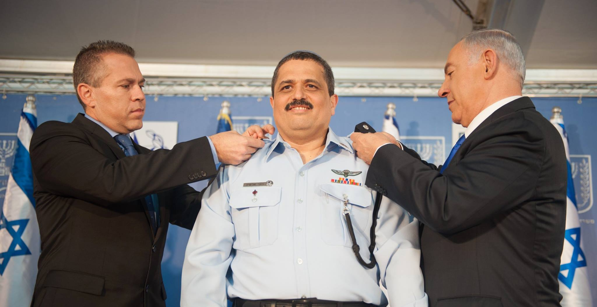 רוני אלשיך (במרכז) בטקס מינויו למפכ"ל. מימין: ראש הממשלה בנימין נתניהו, משמאל: השר לביטחון הפנים גלעד ארדן